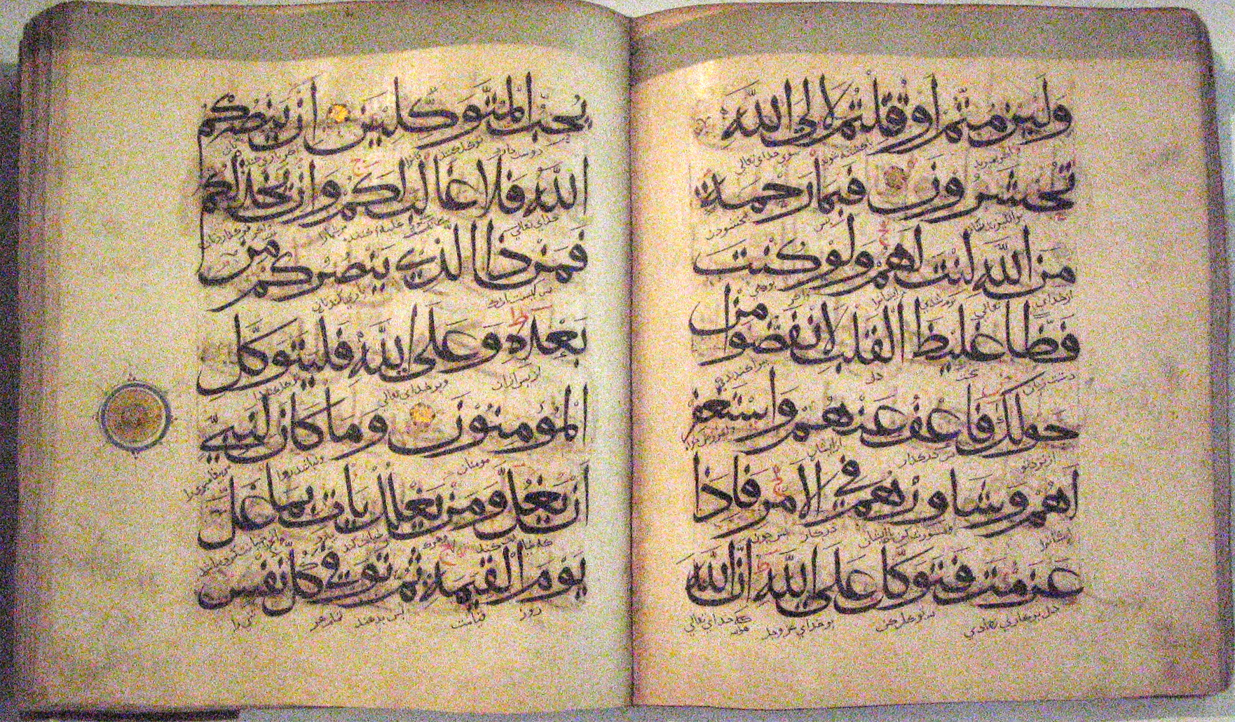 Quran, Mohaqqaq script+traduction en Persan, XIIIe siècle, non signé. National Iran Museum, Tehran.